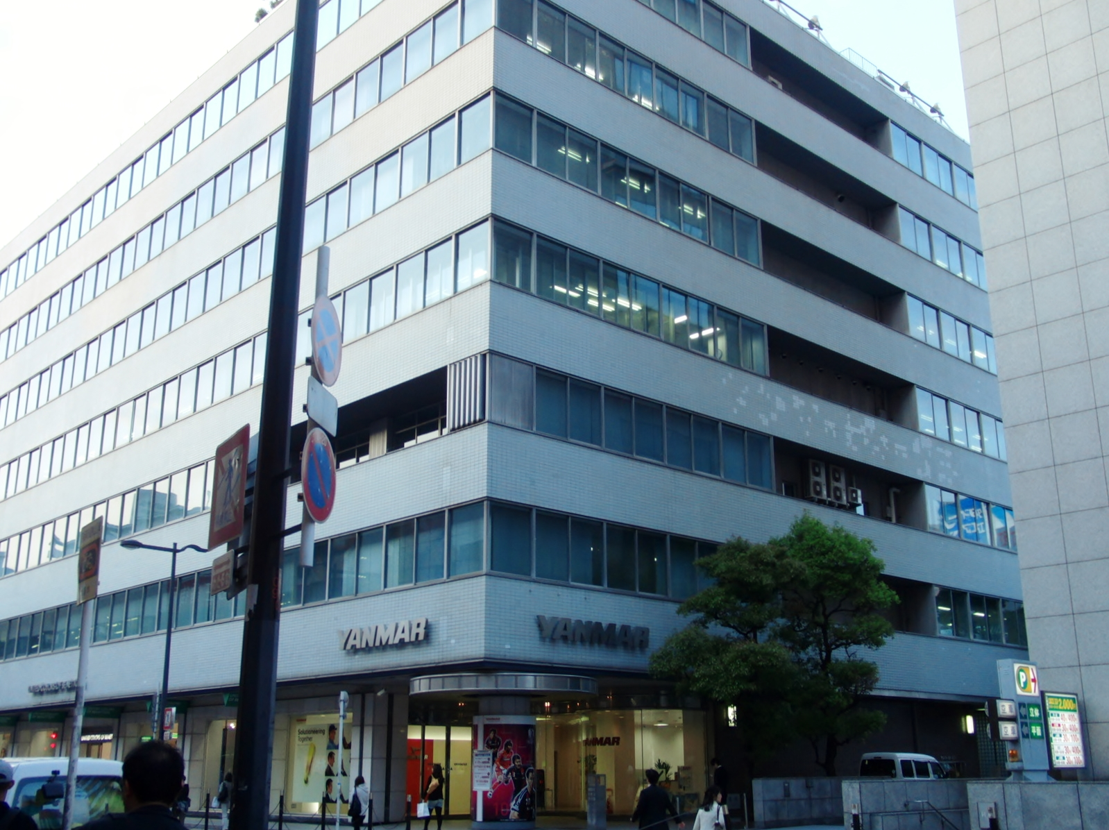 （旧）ヤンマー本社を撮影。